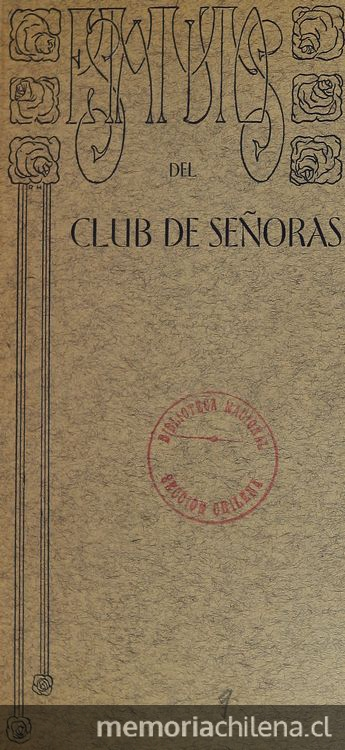 Estatutos del Club de Señoras